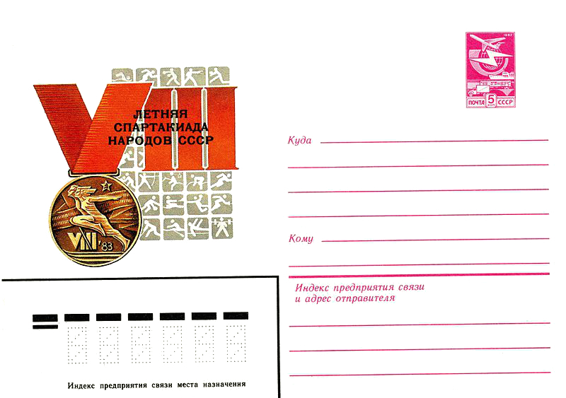 Entier postal décoré soviétique (URSS) sous forme d' une enveloppe et investi d' une valeur fiduciaire de 5 kopecks, imprimé en 1983. A titre indicatif le prix de l' entier postal est de 6 kopecks.